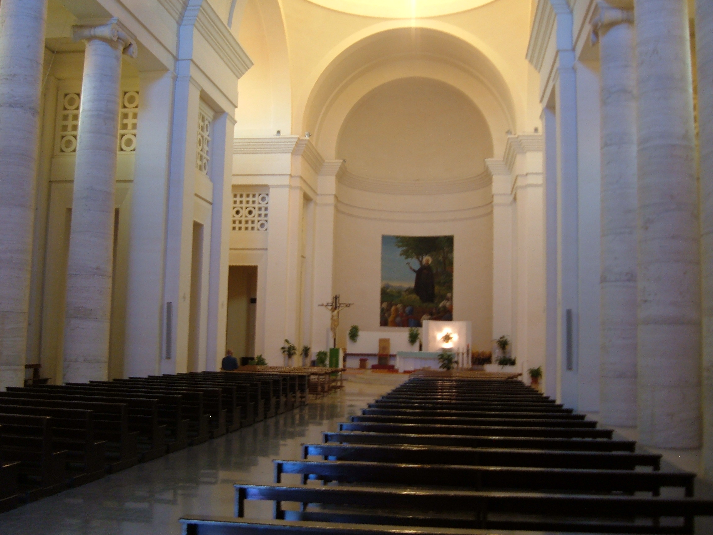 Chiesa di San Francesco Saverio (Garbatella)